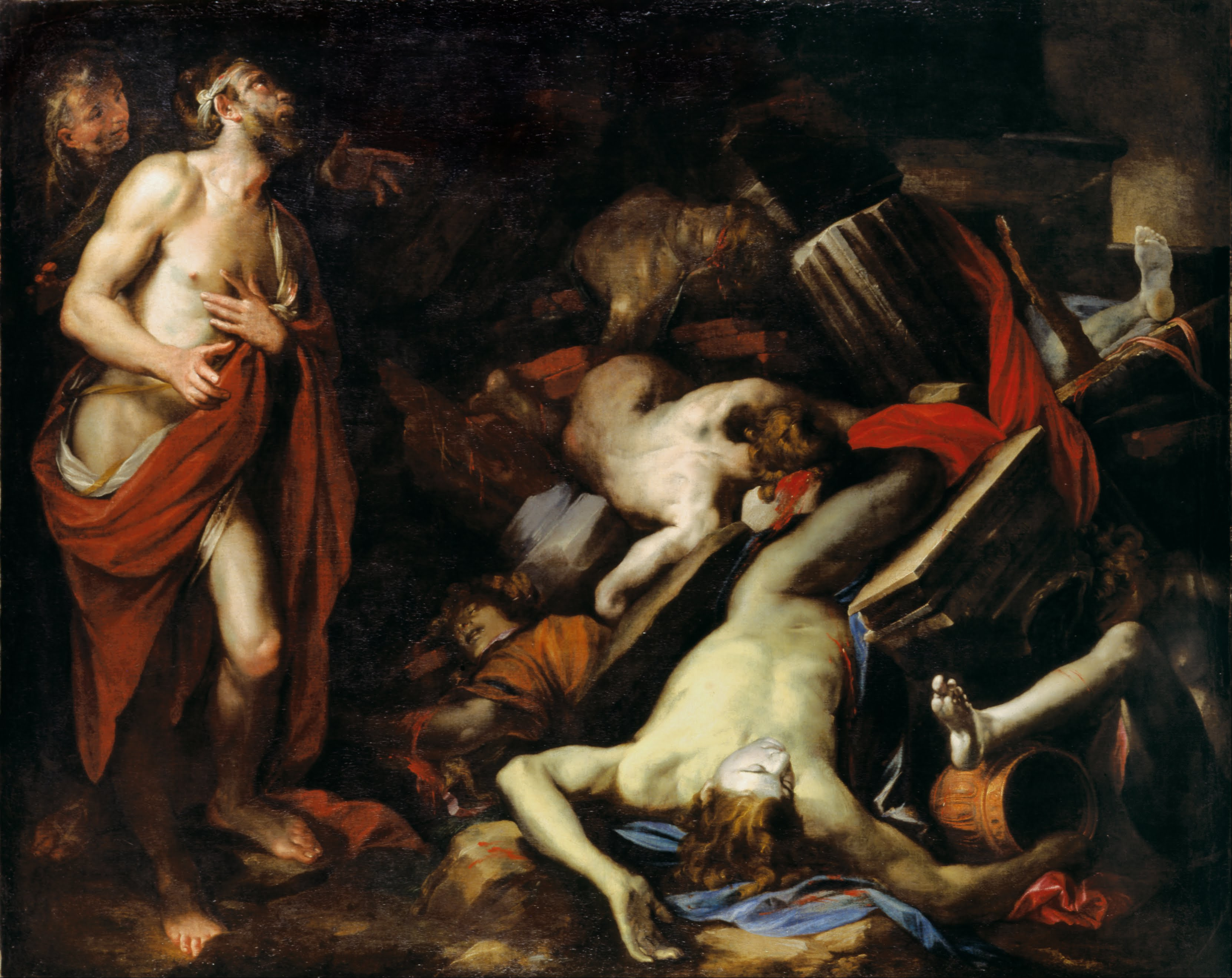 El lienzo representa a Job, un personaje del Antiguo Testamento, junto a los cadáveres de sus hijos muertos.